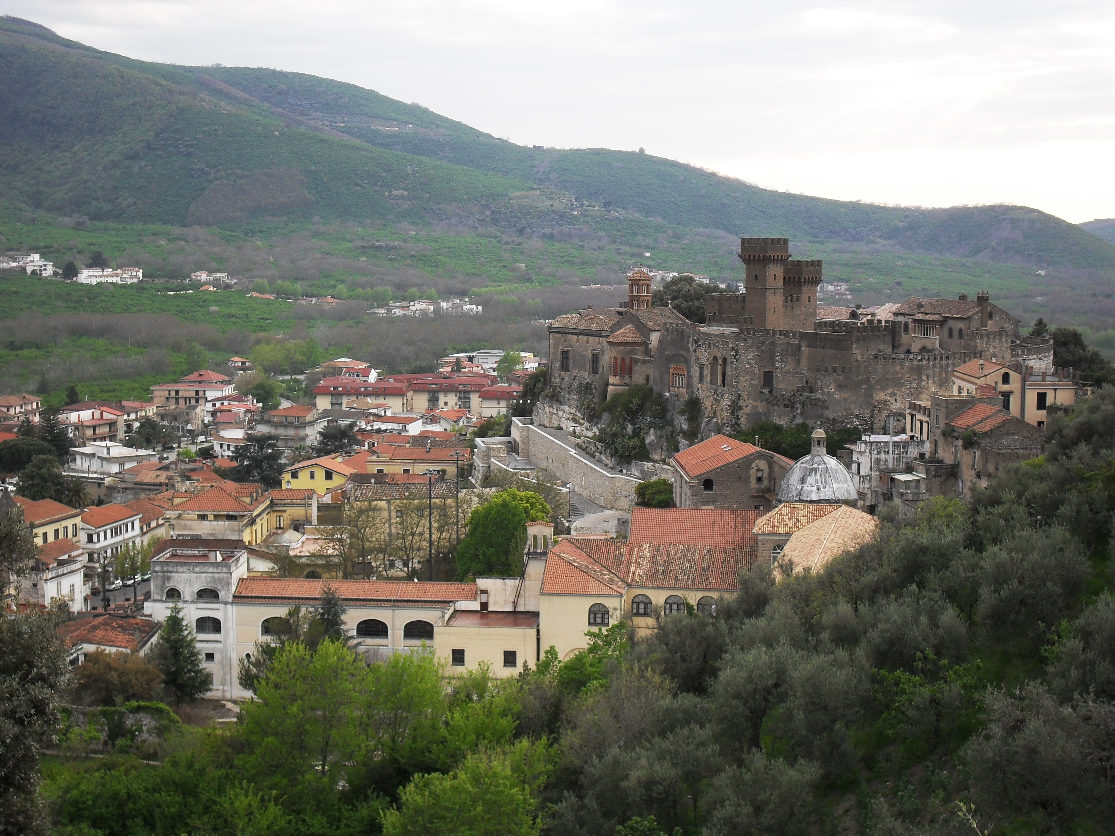 Vista di Lauro (AV), dall'Abbazia di Sant'Angelo. La foto riassume le sue tre caratteristiche principali: il centro storico (a sinistra), il Castello Lancellotti (a destra), il verde che lo circonda.